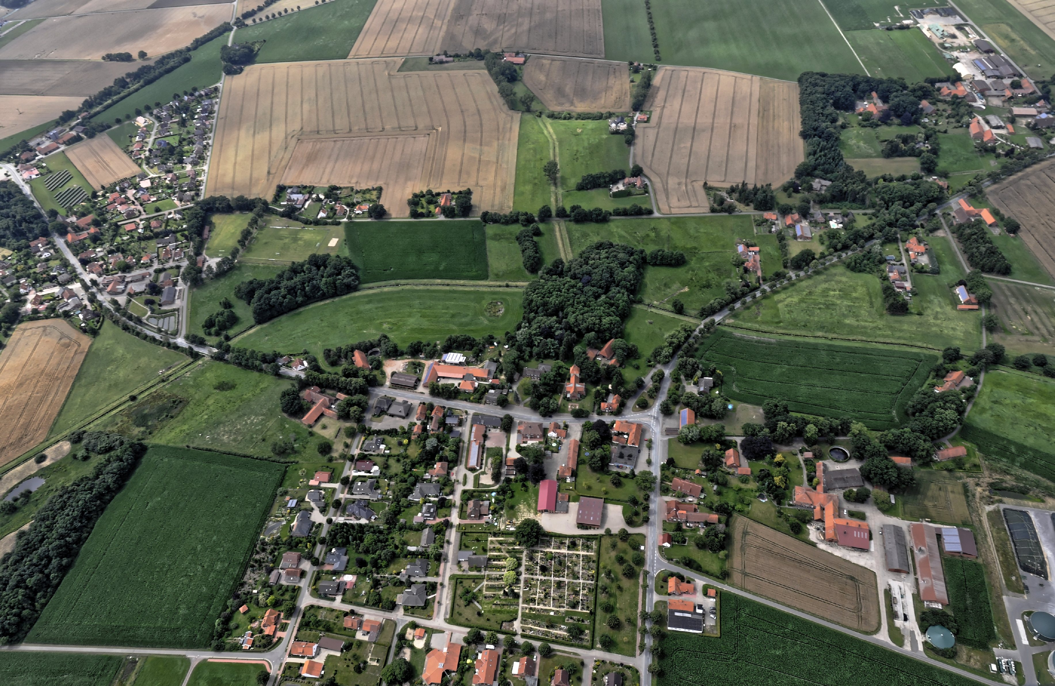 Bilder vom Flug Nordholz-Hammelburg 2015: Blick von Osten auf Mellinghausen.